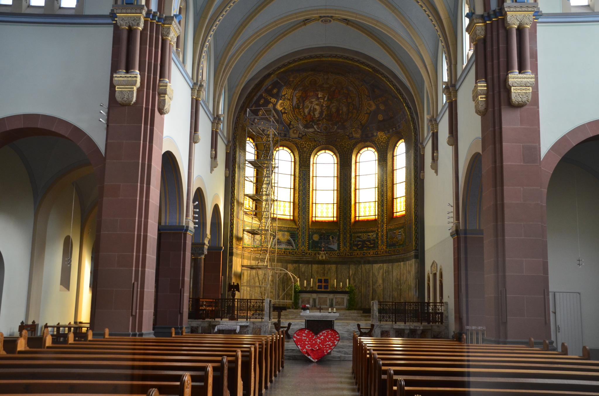 Herz Jesu Kirche in Aachen